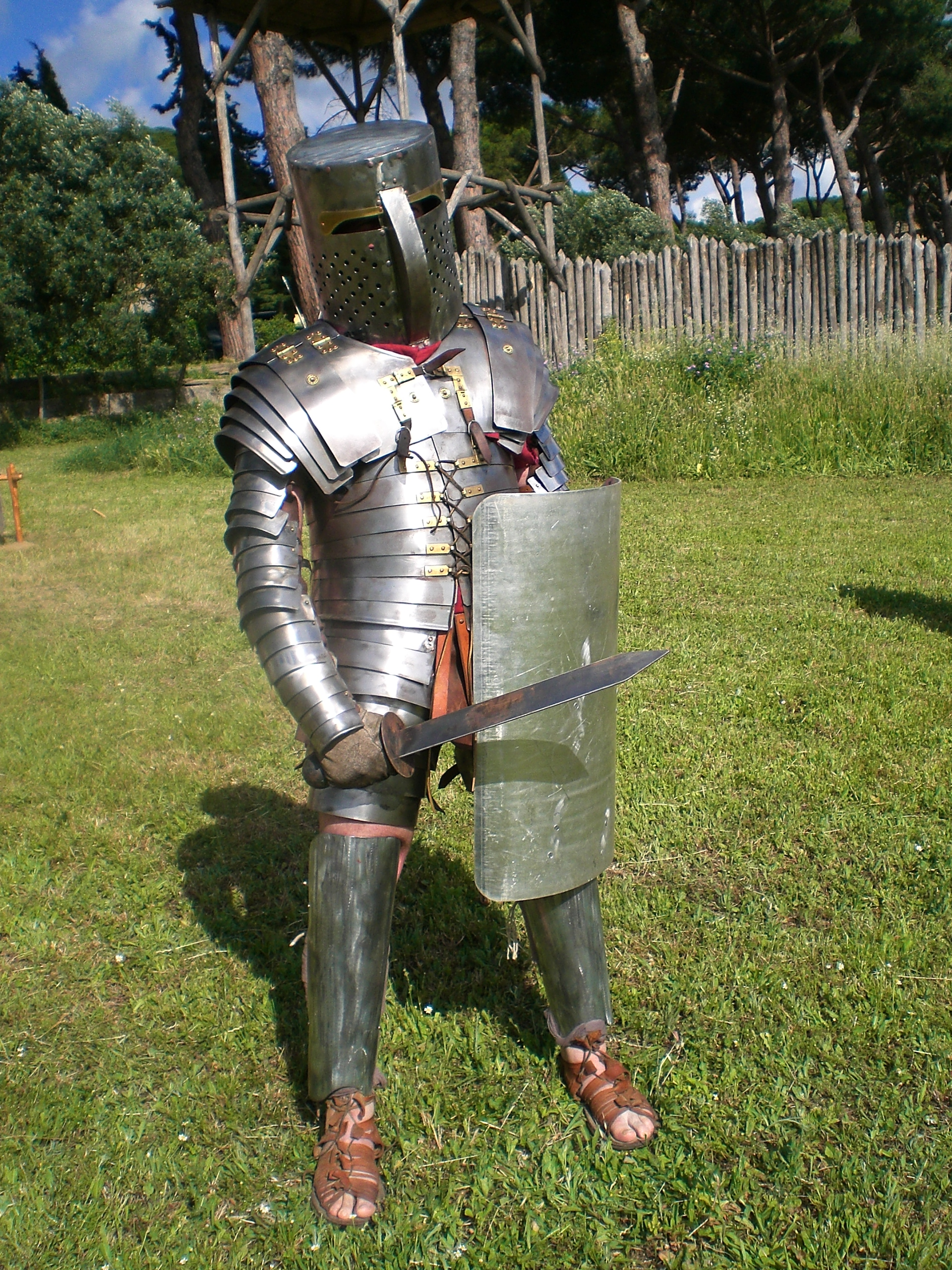 Ricostruzione del GLADIATORE CRUPELLARIUS della Legio XXX Vlpia Traiana Victrix ONLUS.